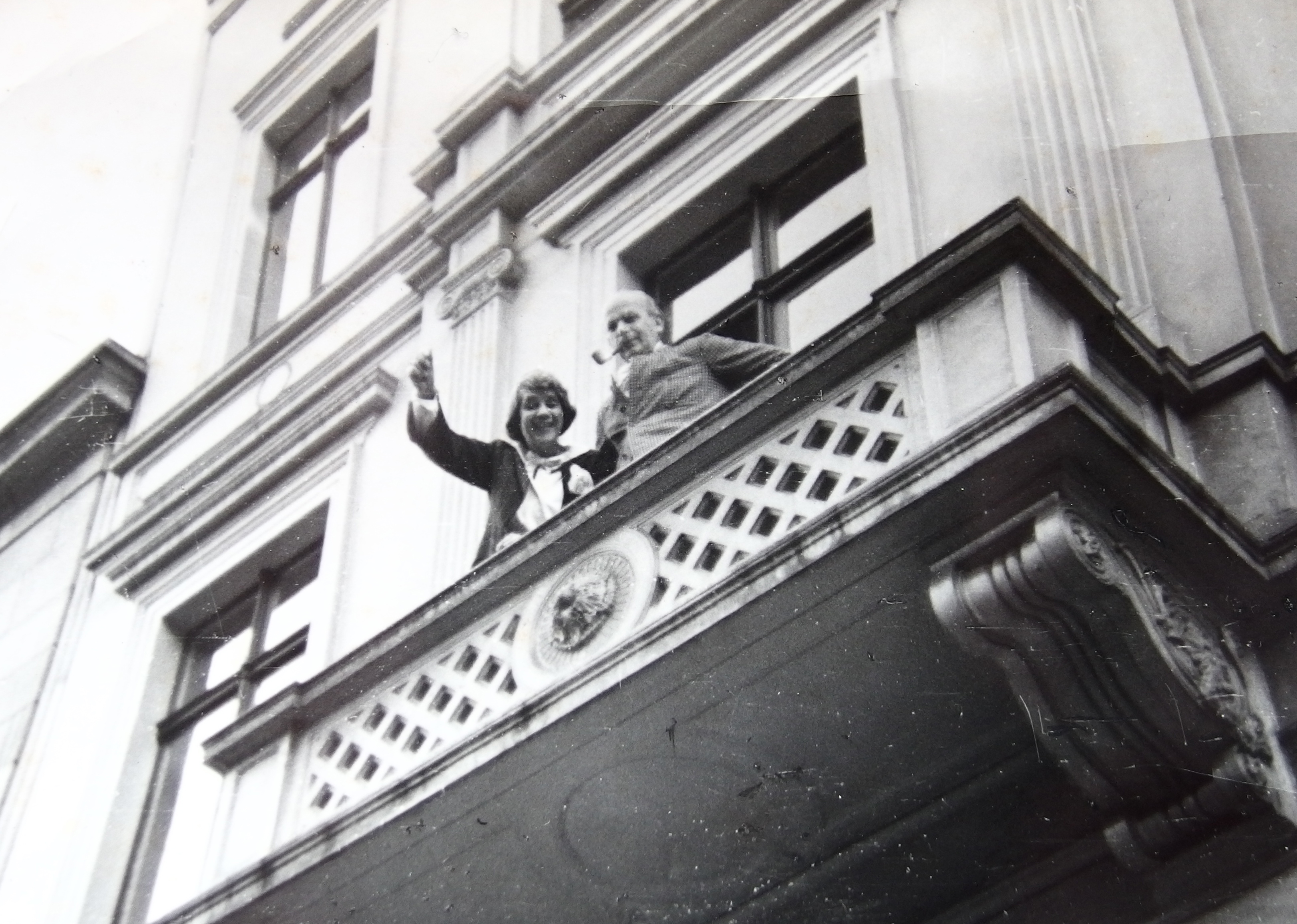 Werner und Mira Heuser, Goltsteinstraße Düsseldorf, November 1938 (Walther Benser fährt gerade ab)